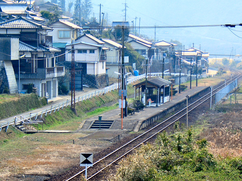 JR肥薩線段駅 構内遠景 写真手前が八代駅方面。手前は駅舎跡地、右側が球磨川。 撮影者/著者/著作権保有者 : MK Products (本人がアップロード) 撮影日 : 2007/02/06 段駅用にアップロードした画像です。良い画像があれば別の画像に変えてください。